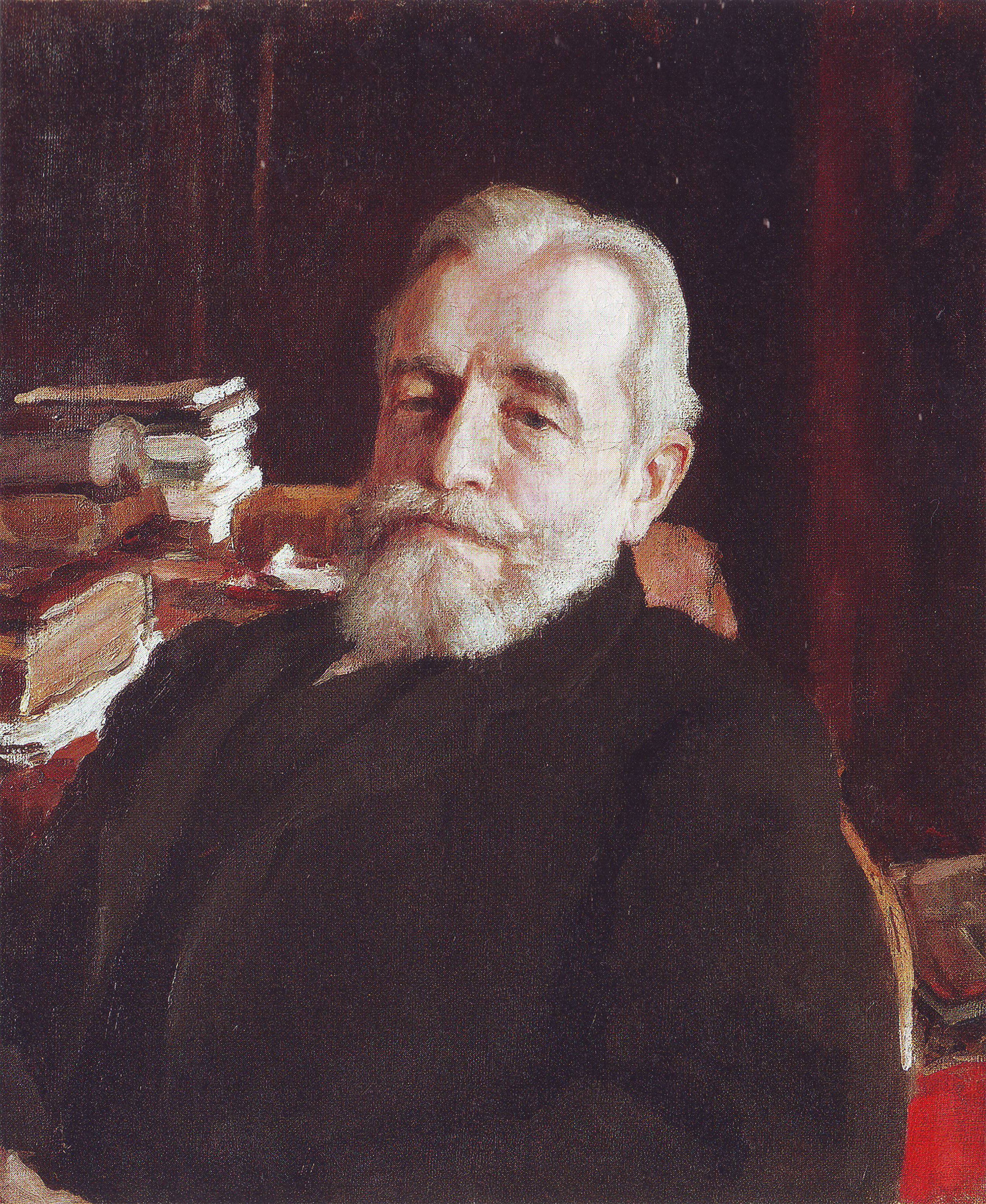 Дервиз, Дмитрий Григорьевич. Фонд В. Серова